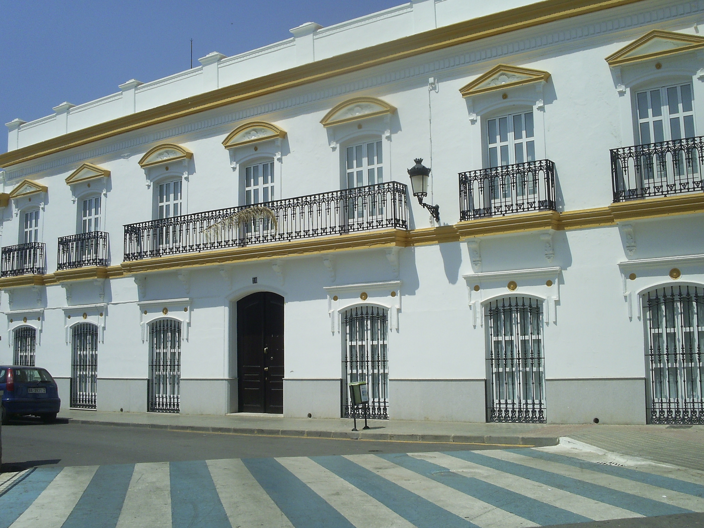 Colegio de Nuestra Sra. del Carmen, Puebla de la Calzada, España